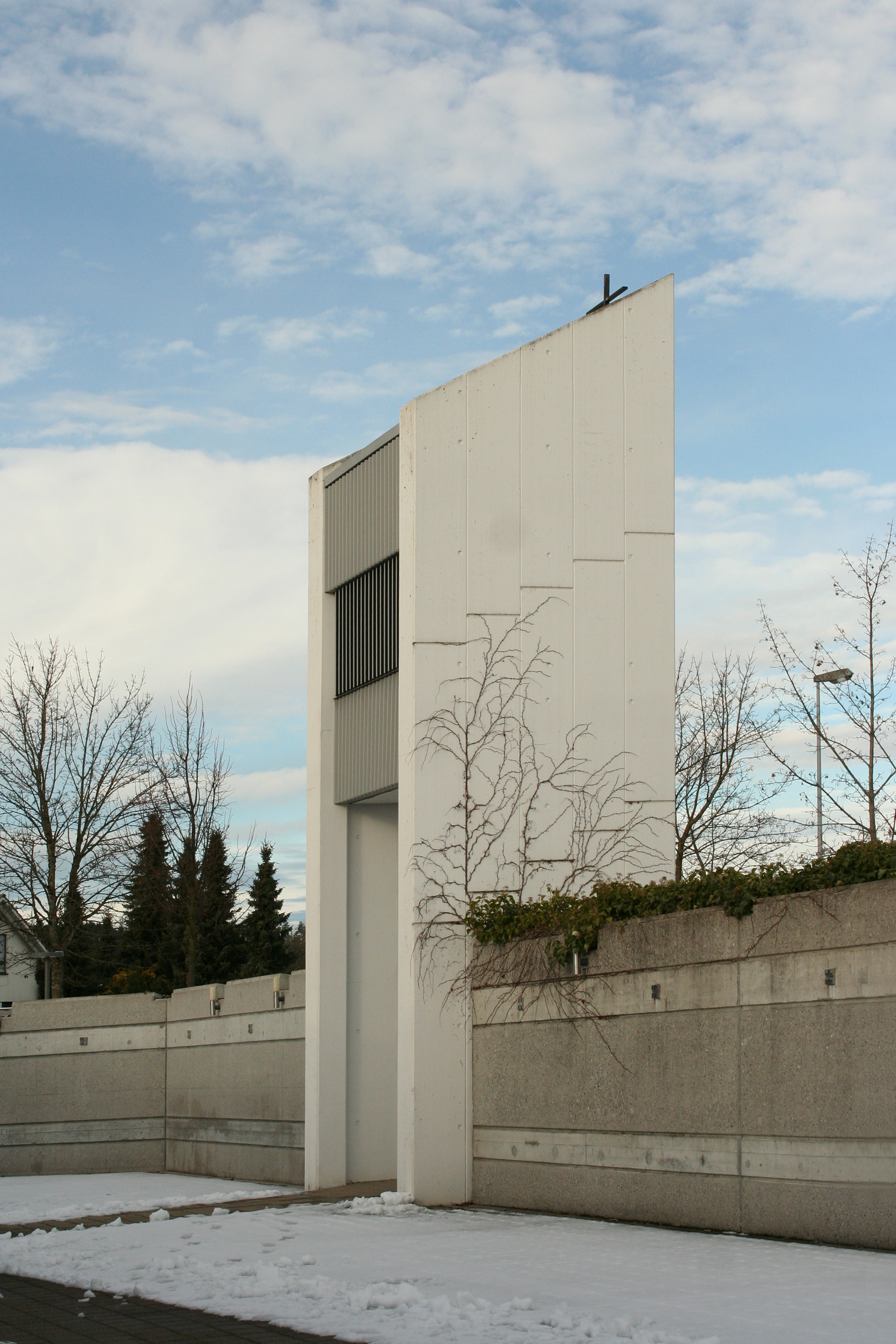 Römisch-katholische Kirche St. Franziskus Maur-Ebmatingen, Kirchturm